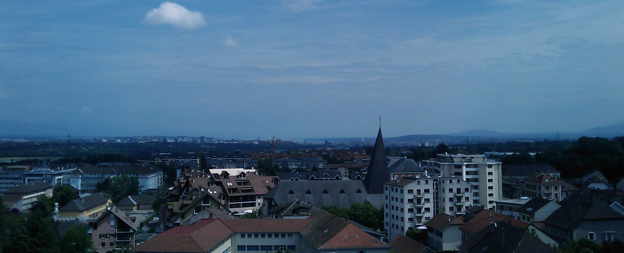 Panorama de St Julien avec Genève à l'arrière-plan.